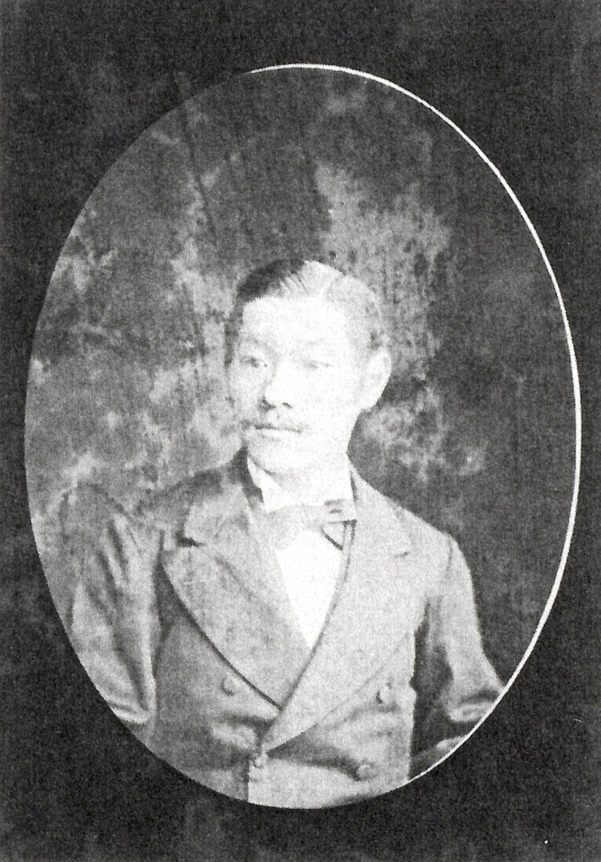 中御門経明の肖像写真。